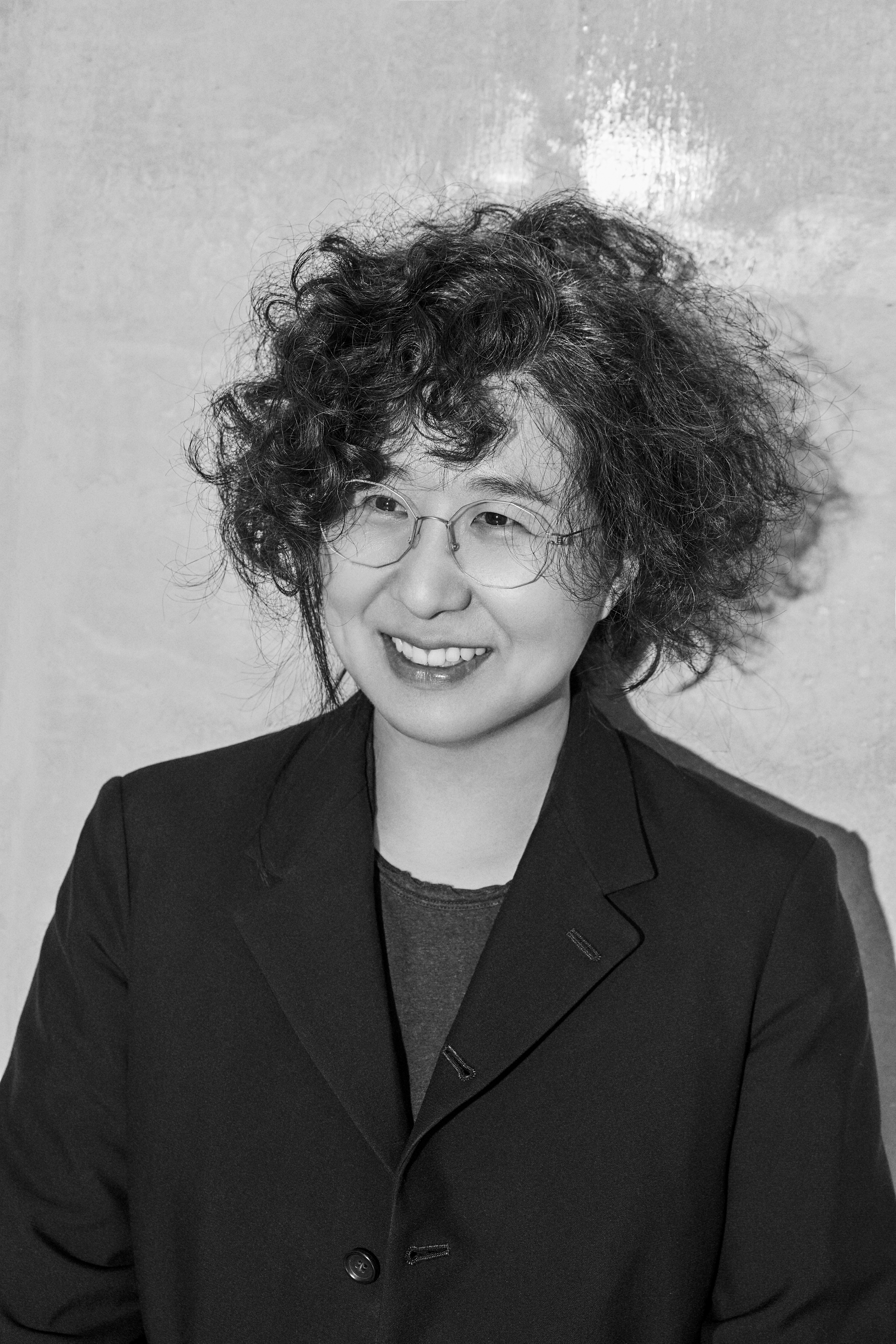 Courtesy of the artist and Kukje gallery